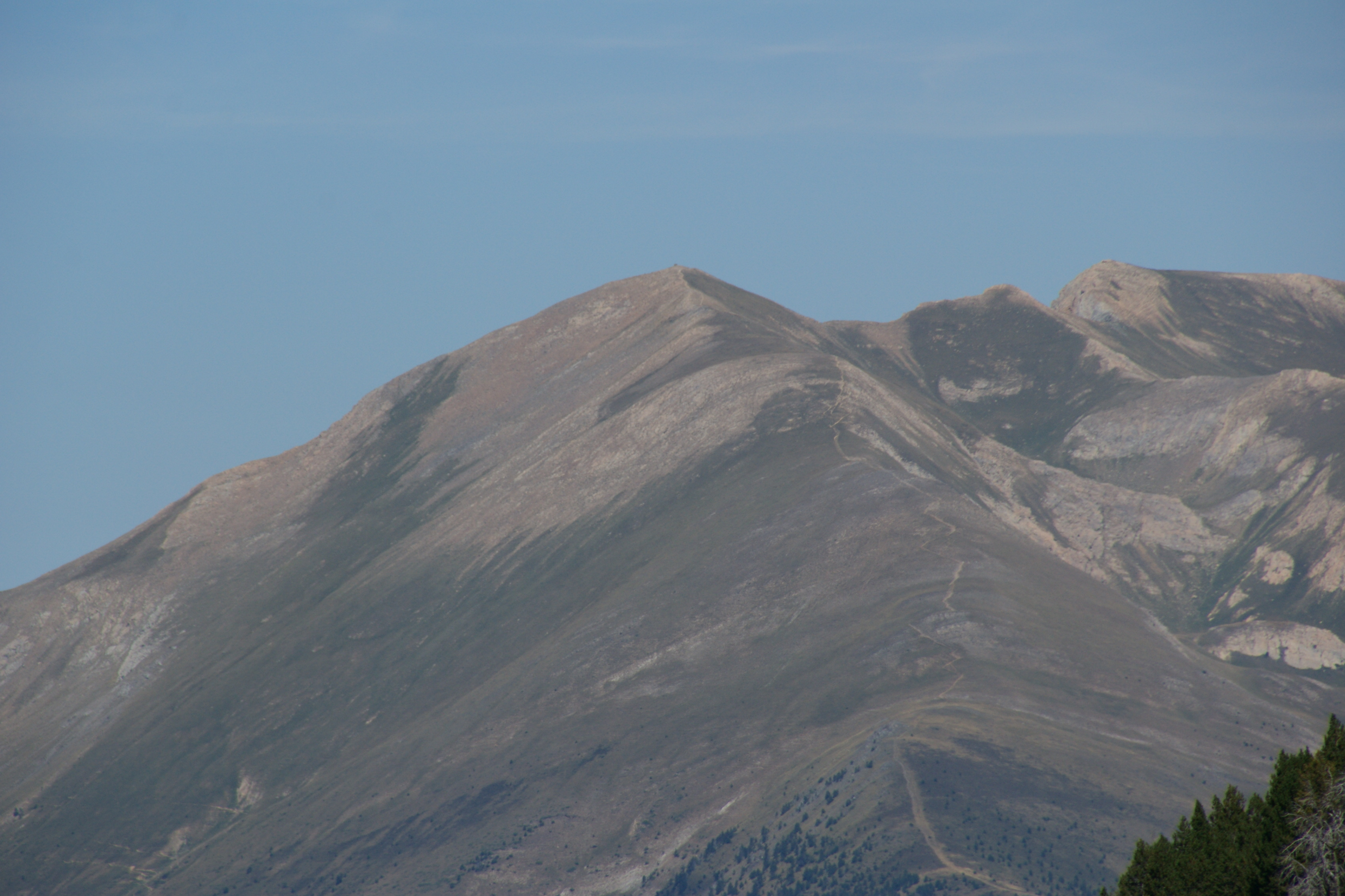 MassÃ­s del Casamanya This is a a photo of a natural area in Andorra with id: AD-AGC